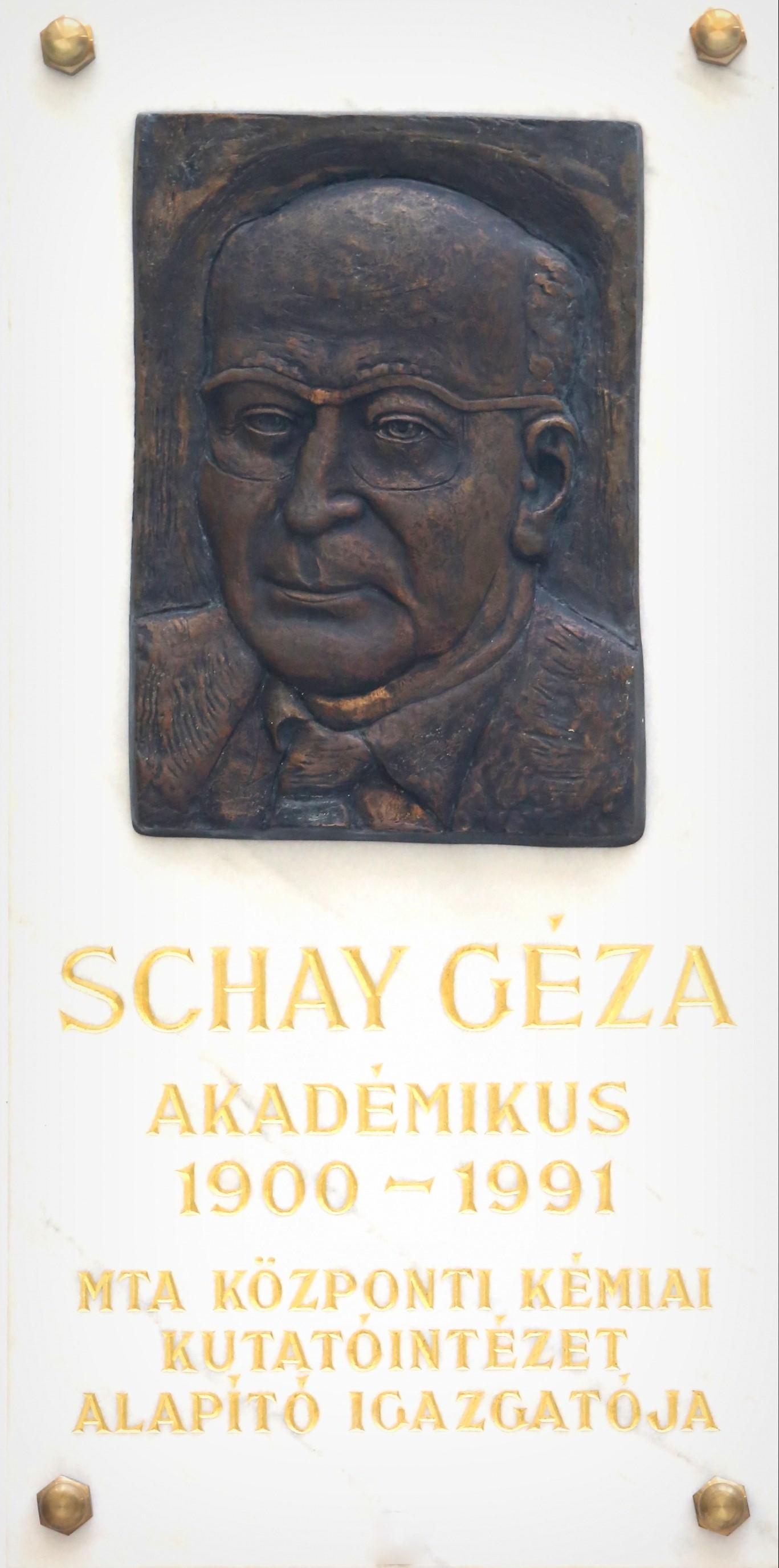 Schay Géza emléktábla, az MTA TTK épületében